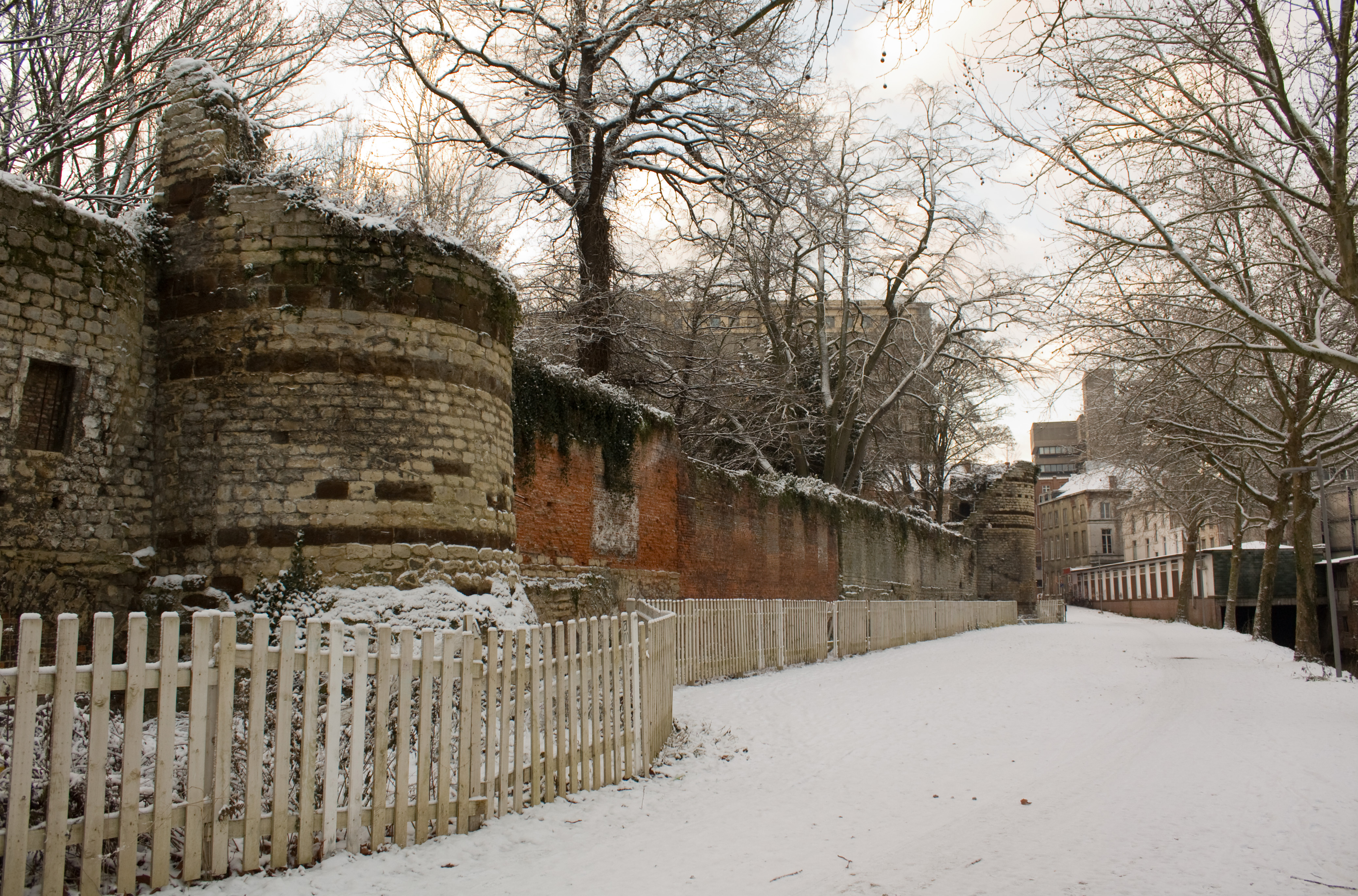 Deel van de 12e eeuwse stadsmuur aan de Handbogenhof te Leuven